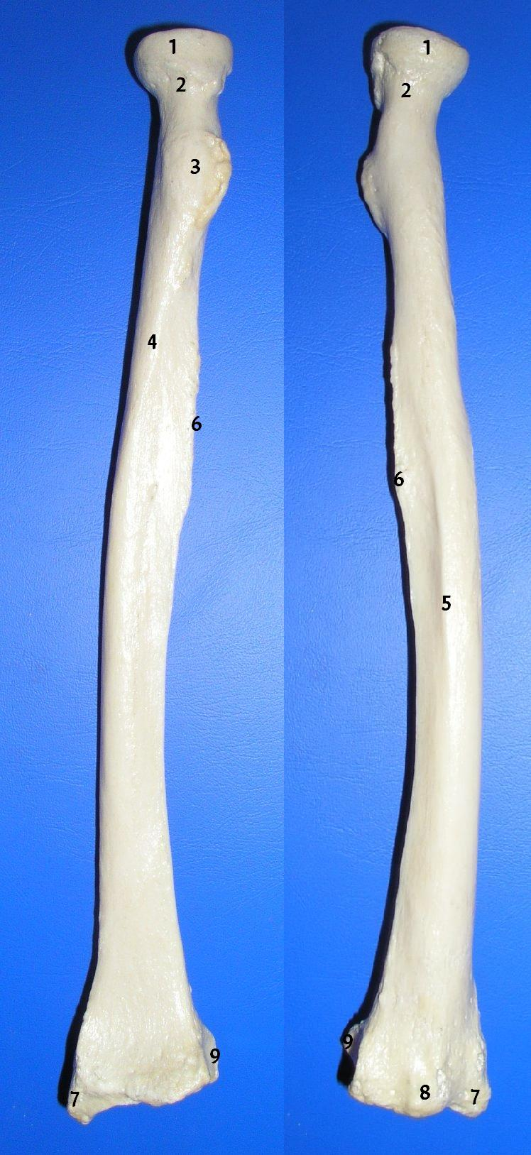 מקורות מתוך ויקישיתוף, נערכו על ידי והועלו מחדש